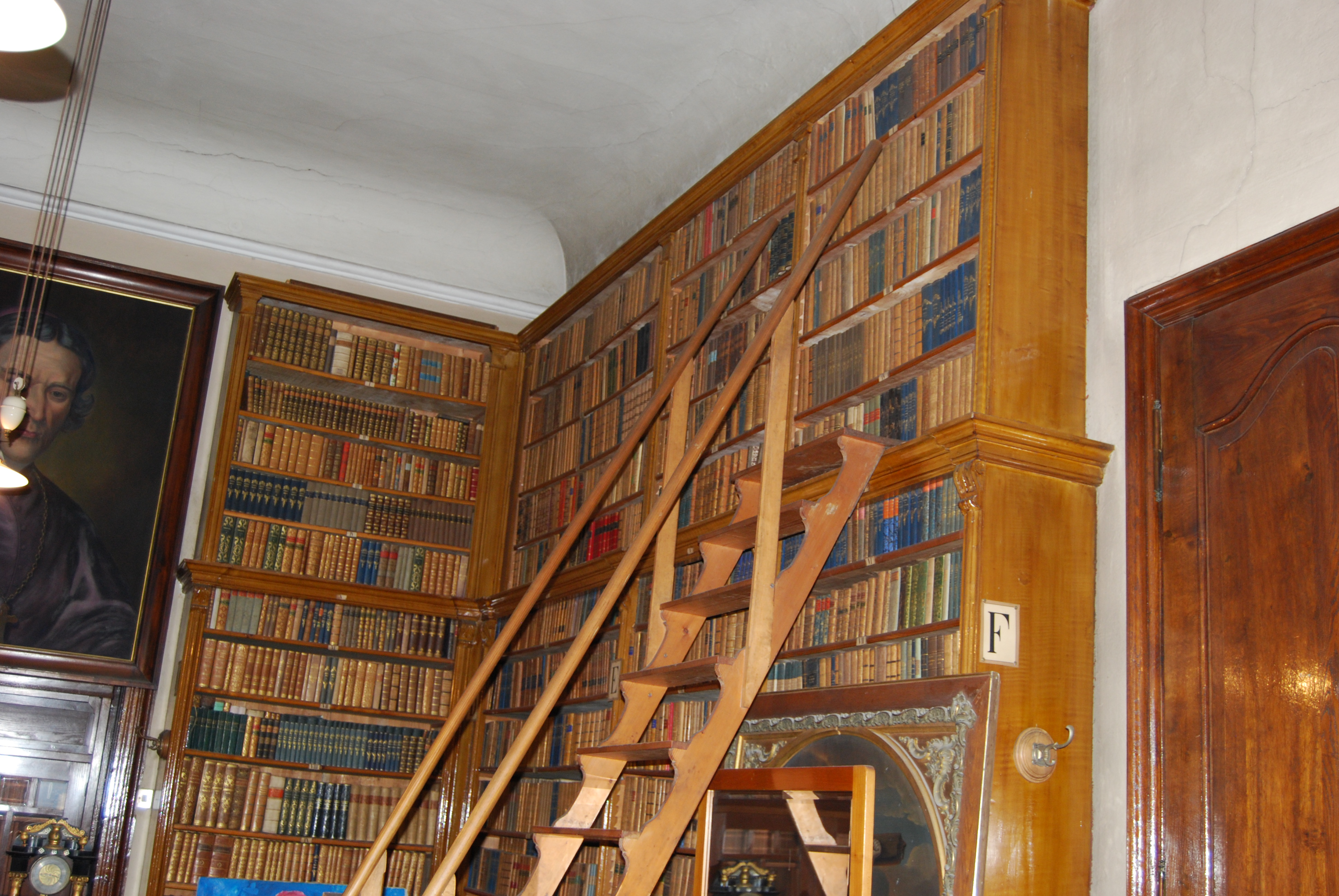 Škofijska knjižnica v Ljubljani-Vidmarjeva knjižnica, škofijski dvorec, Ciril-Metodov trg 4.